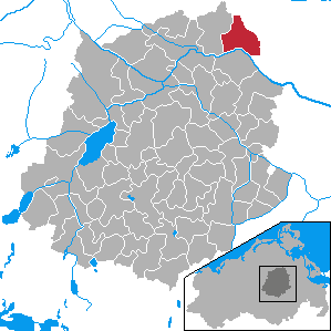 Görmin, Landkreis Demmin, Mecklenburg-Vorpommern